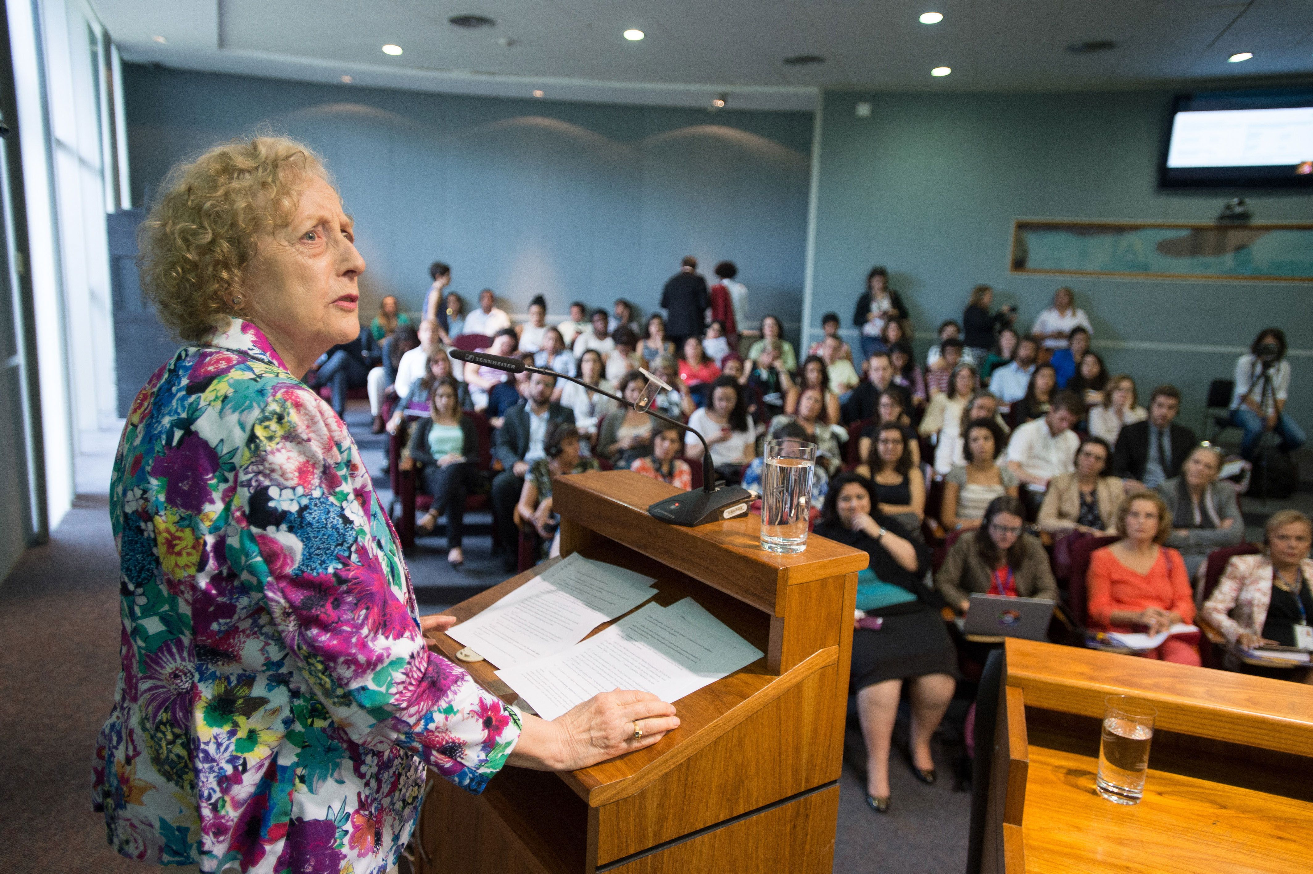 A teórica feminista Carole Pateman, reconhecida mundialmente pela produção acadêmica no campo da Participação e Teoria Democrática, durante o painel Pequim+20: Mais Mulheres na Política